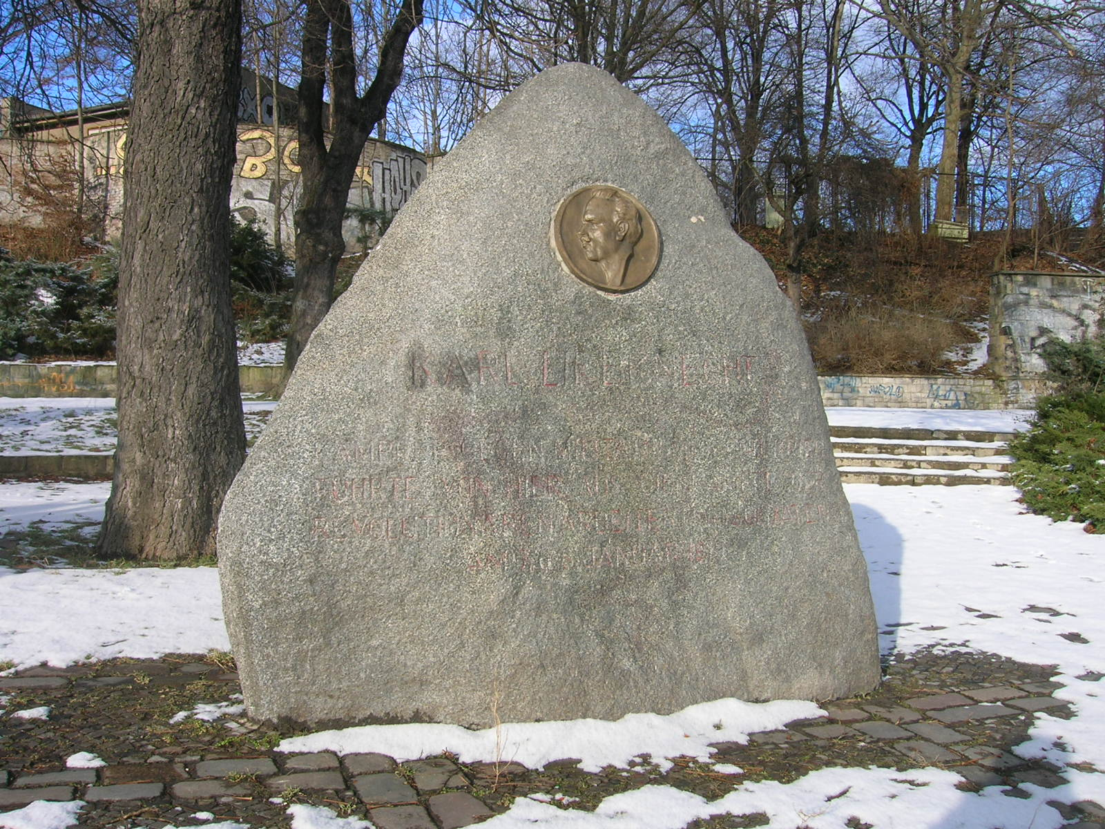 Berlin, Gedenkstein für Karl Liebknecht aus dem Jahr 1959 an der Ecke Prenzlauer Allee/Saarbrücker Straße photo taken by Mazbln on February 4, 2006